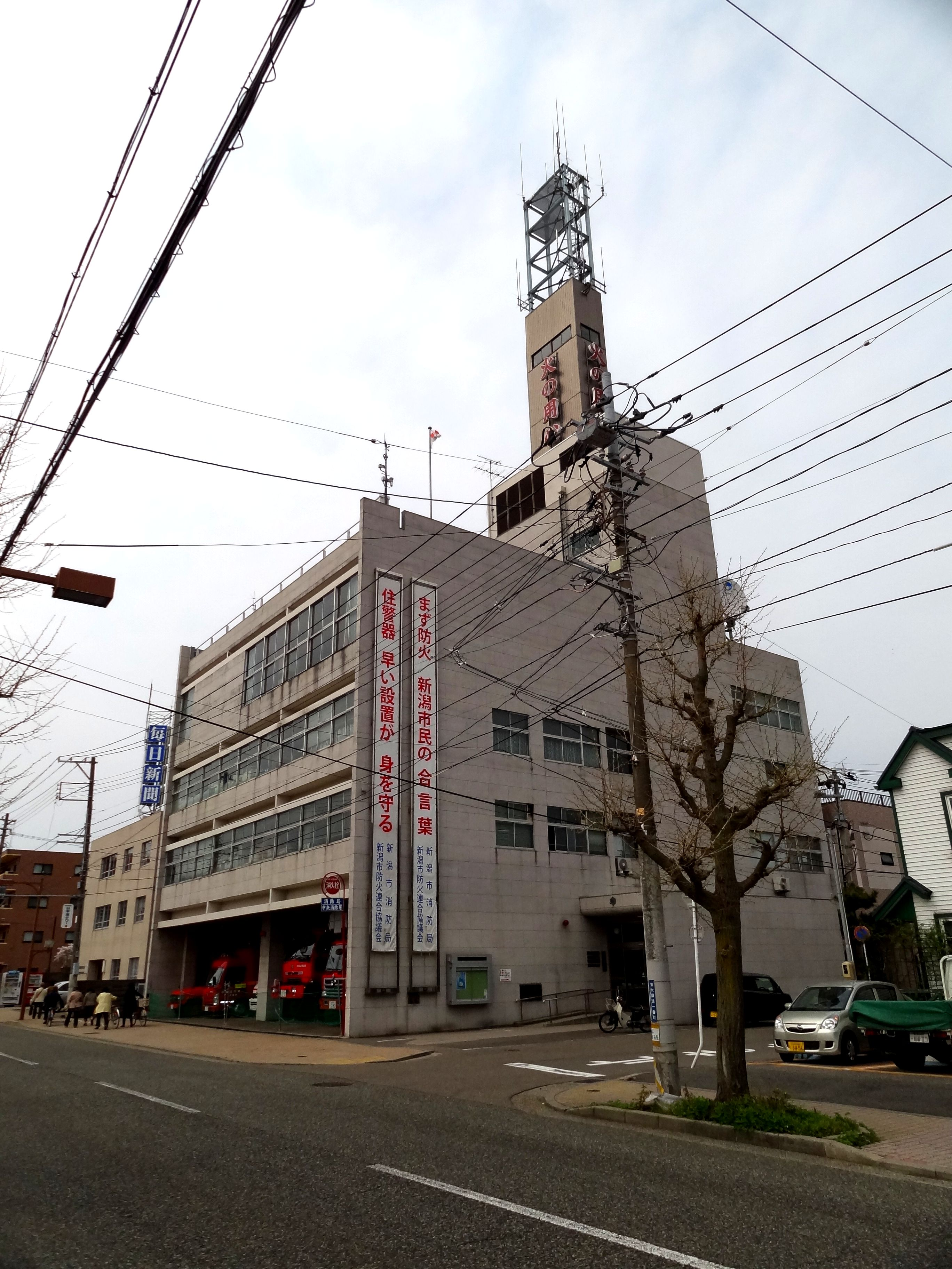 新潟市消防局（新潟市中央消防署）